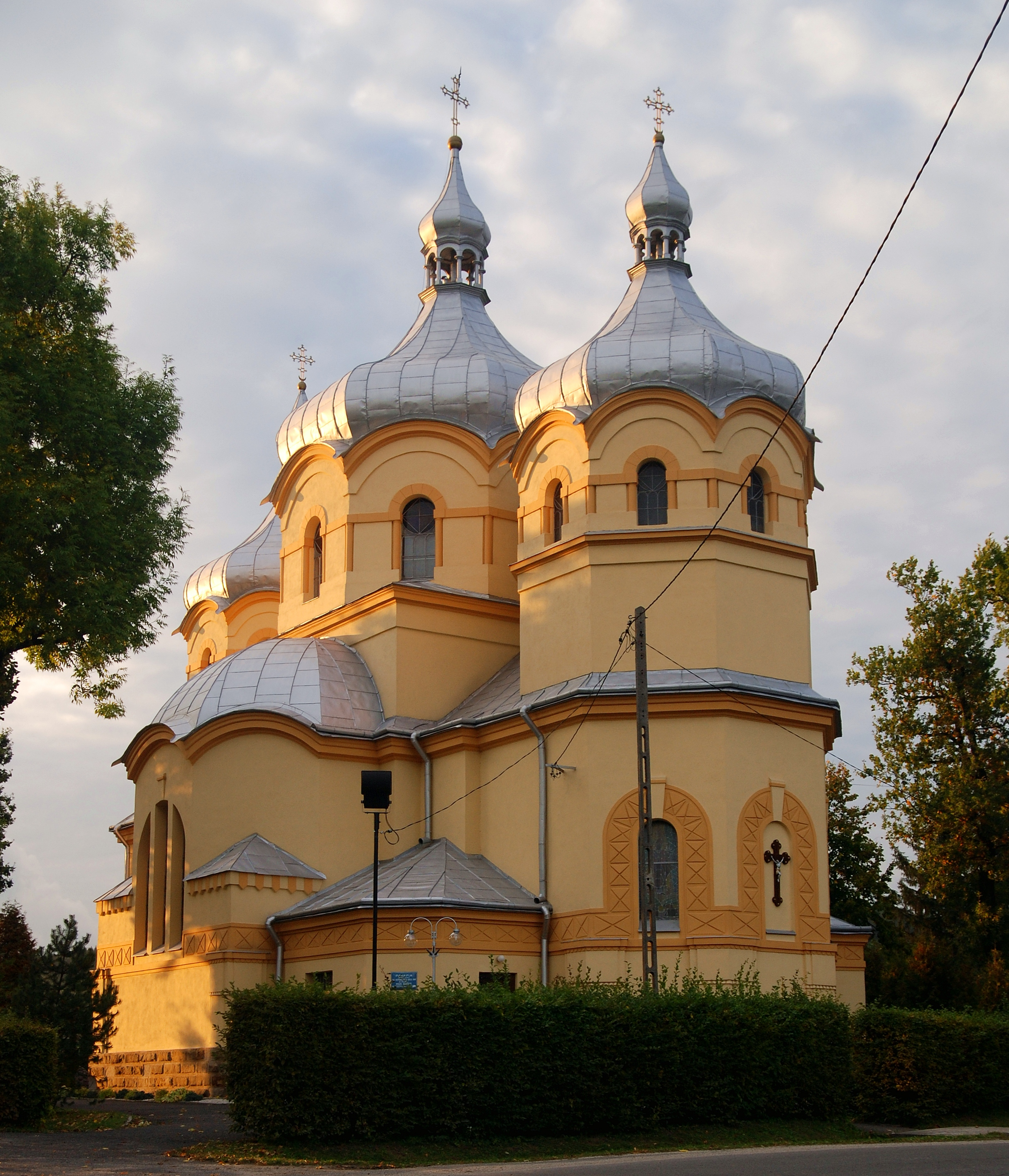 Krasna, cerkiew gr.-kat. p.w. św. Michała, ob. kościół rzym.-kat. par. p.w. Niepokalanego …, 1912